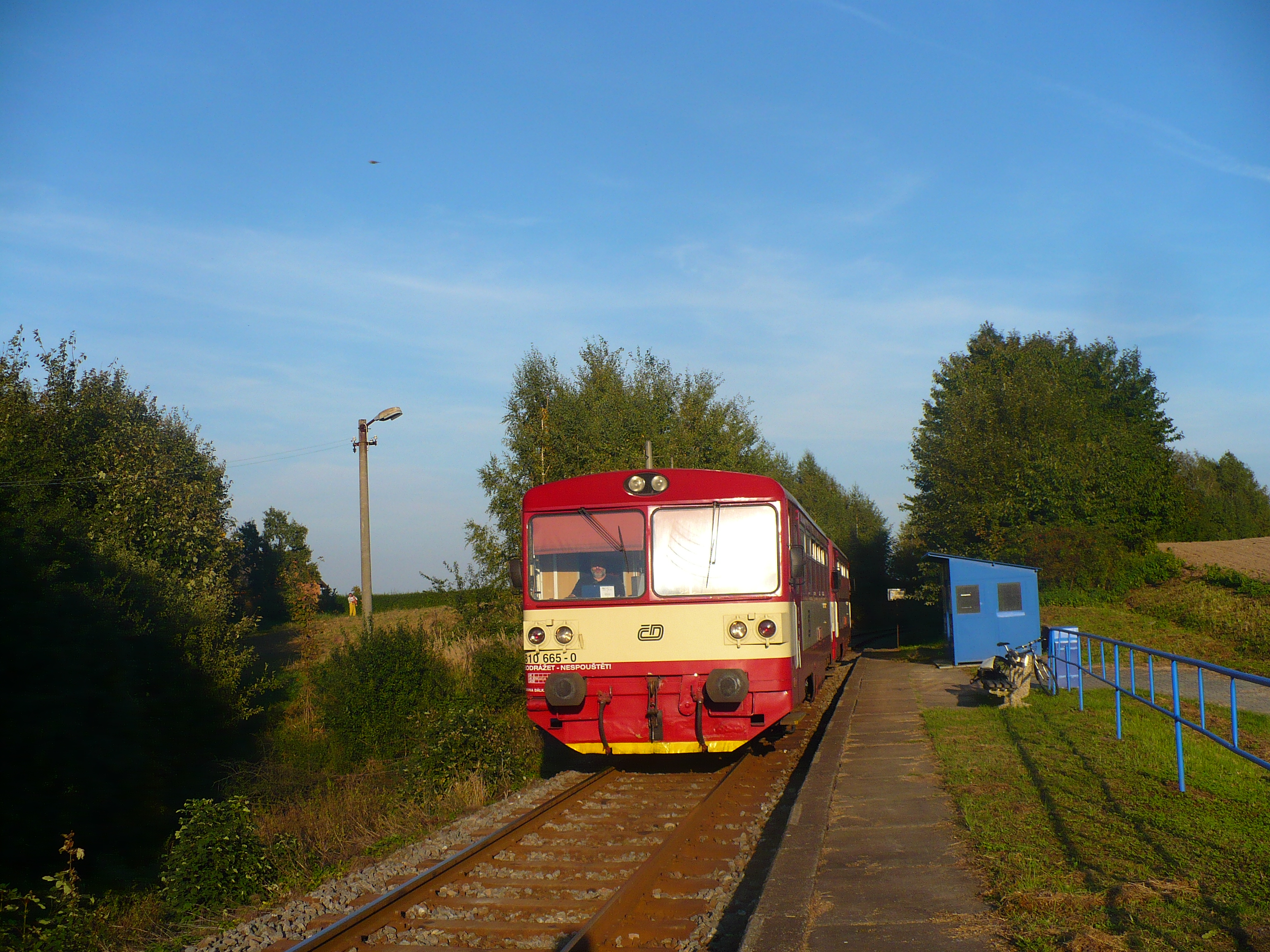 Vlak projíždějící zastávkou Trpík